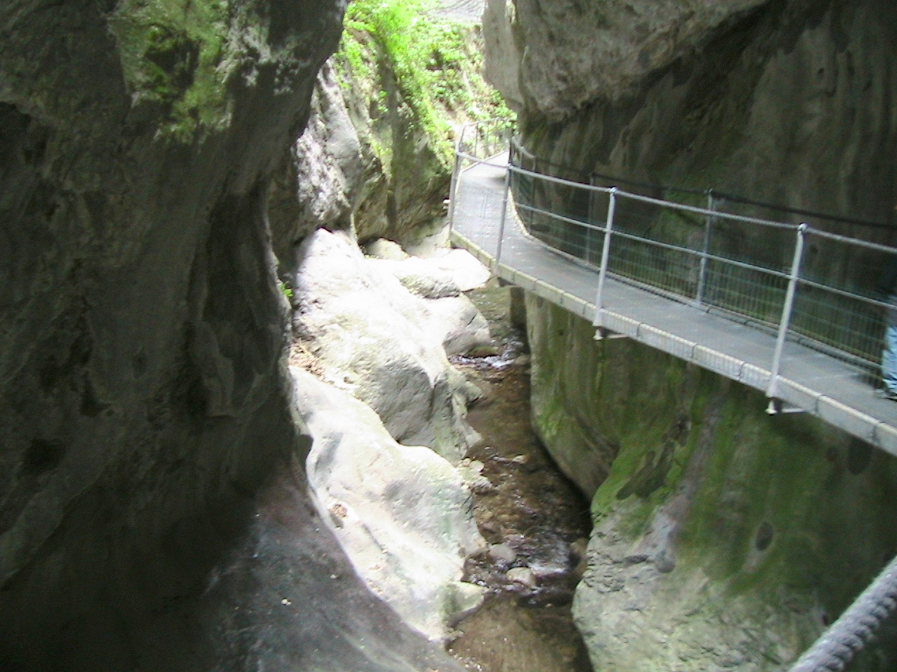 Gorges de la Fou (Arles-sur-Tech, Pyrénées-Orientales, France).